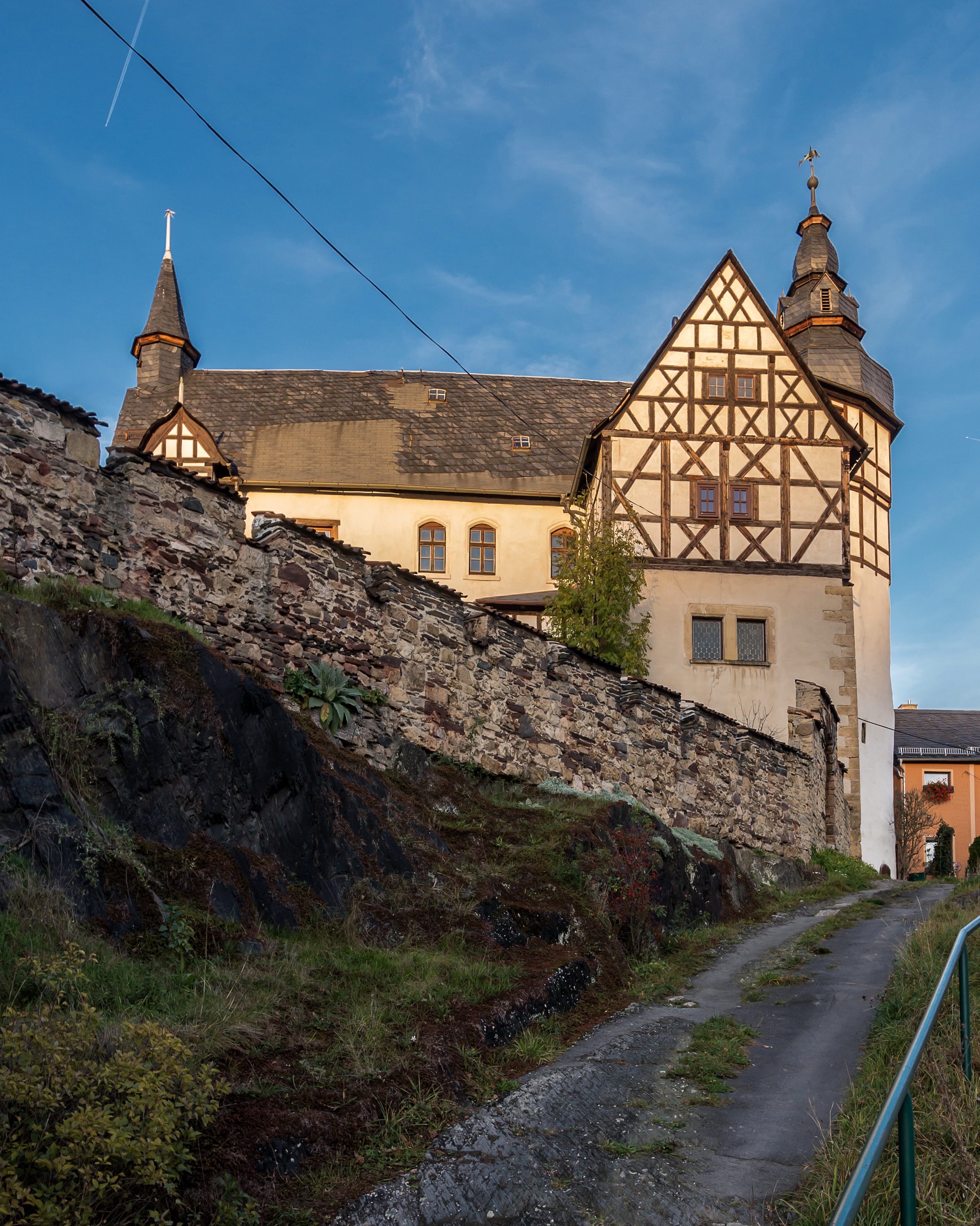 Kaulsdorf Lastweg 1a Schloss mit Grundstück und Einfriedung